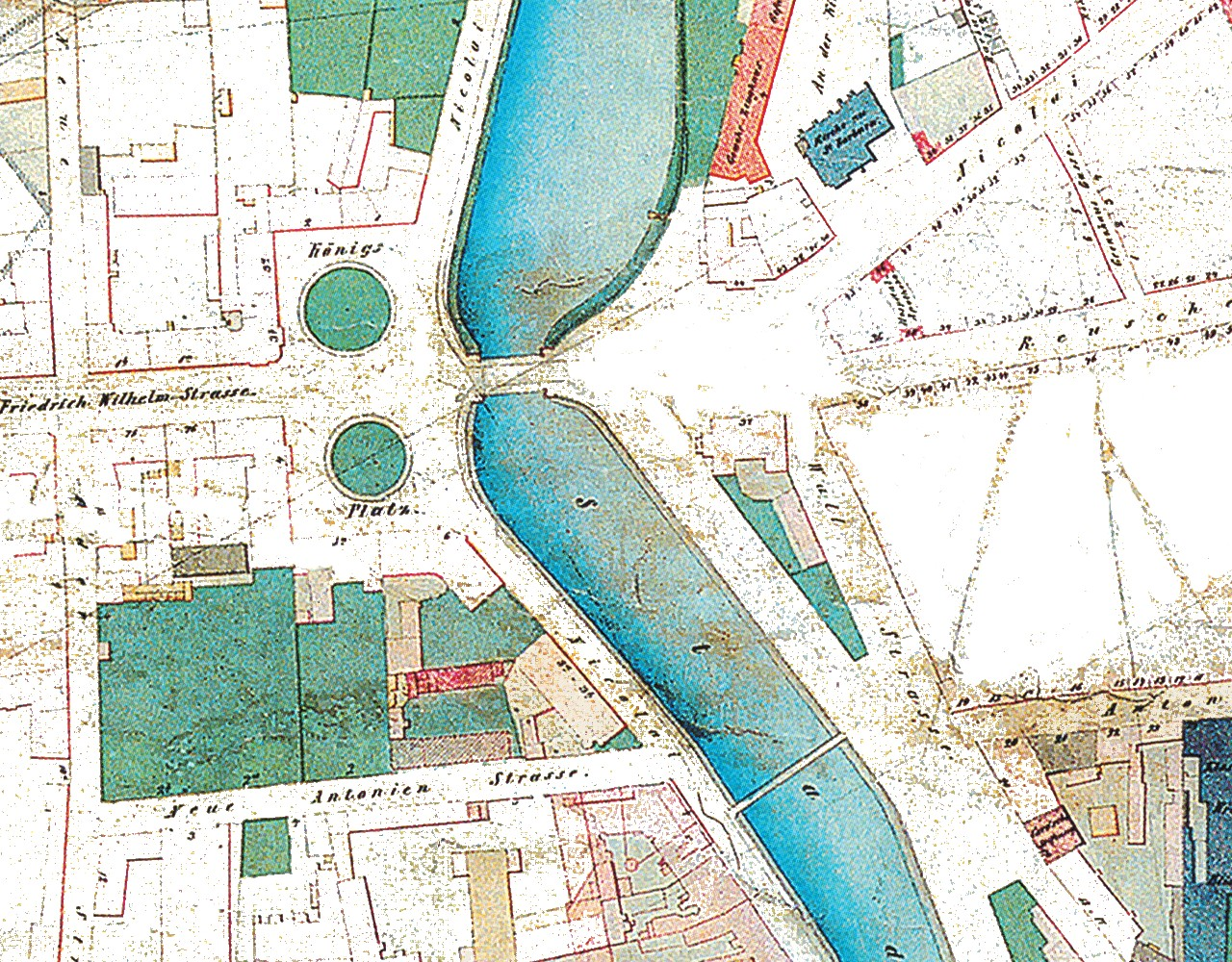 Königsplatz in Breslau, before 1866